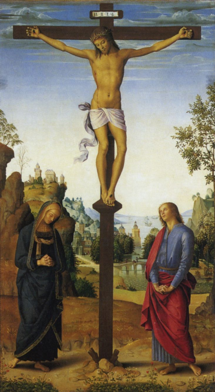 Pietro Perugino: Trittico Galitzin (Crocifisso con la Madonna, San Giovanni Evangelista, Santa Maria Maddalena e San Girolamo). Cat. no. 16 in Vittoria Garibaldi: Perugino. Catalogo completo. Octavo, Firenze 2000, ISBN 88-8030-091-1